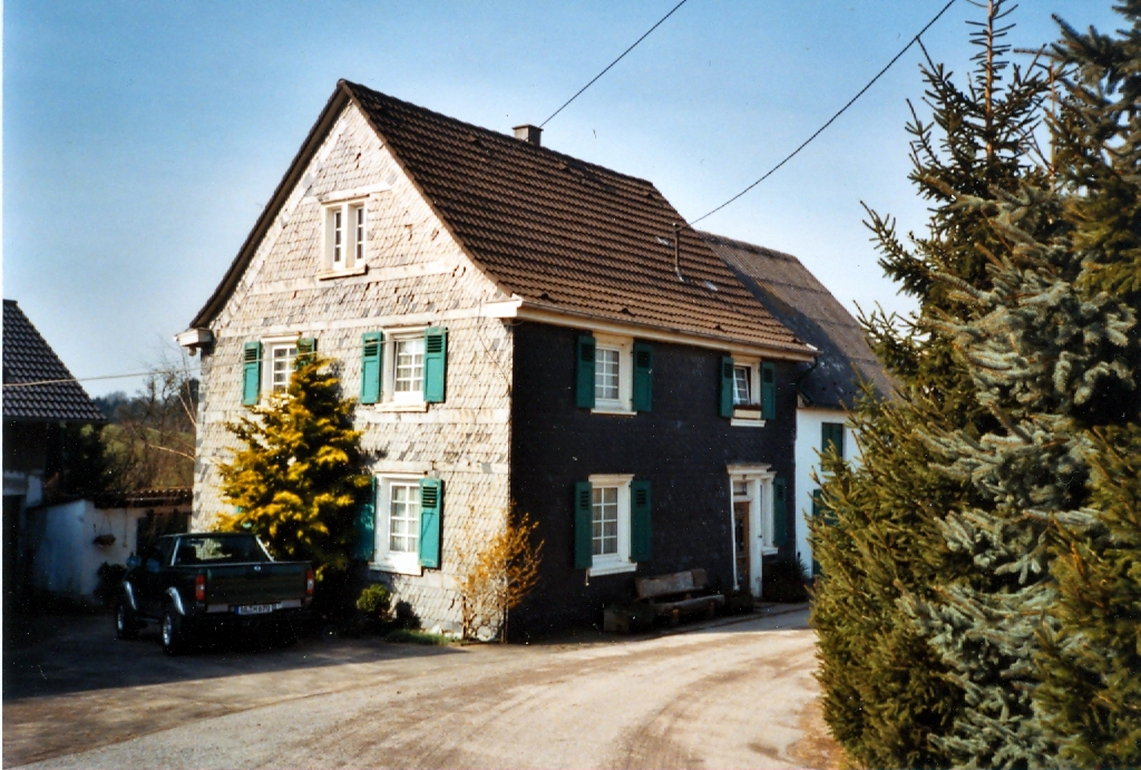 Hinterweger Hof